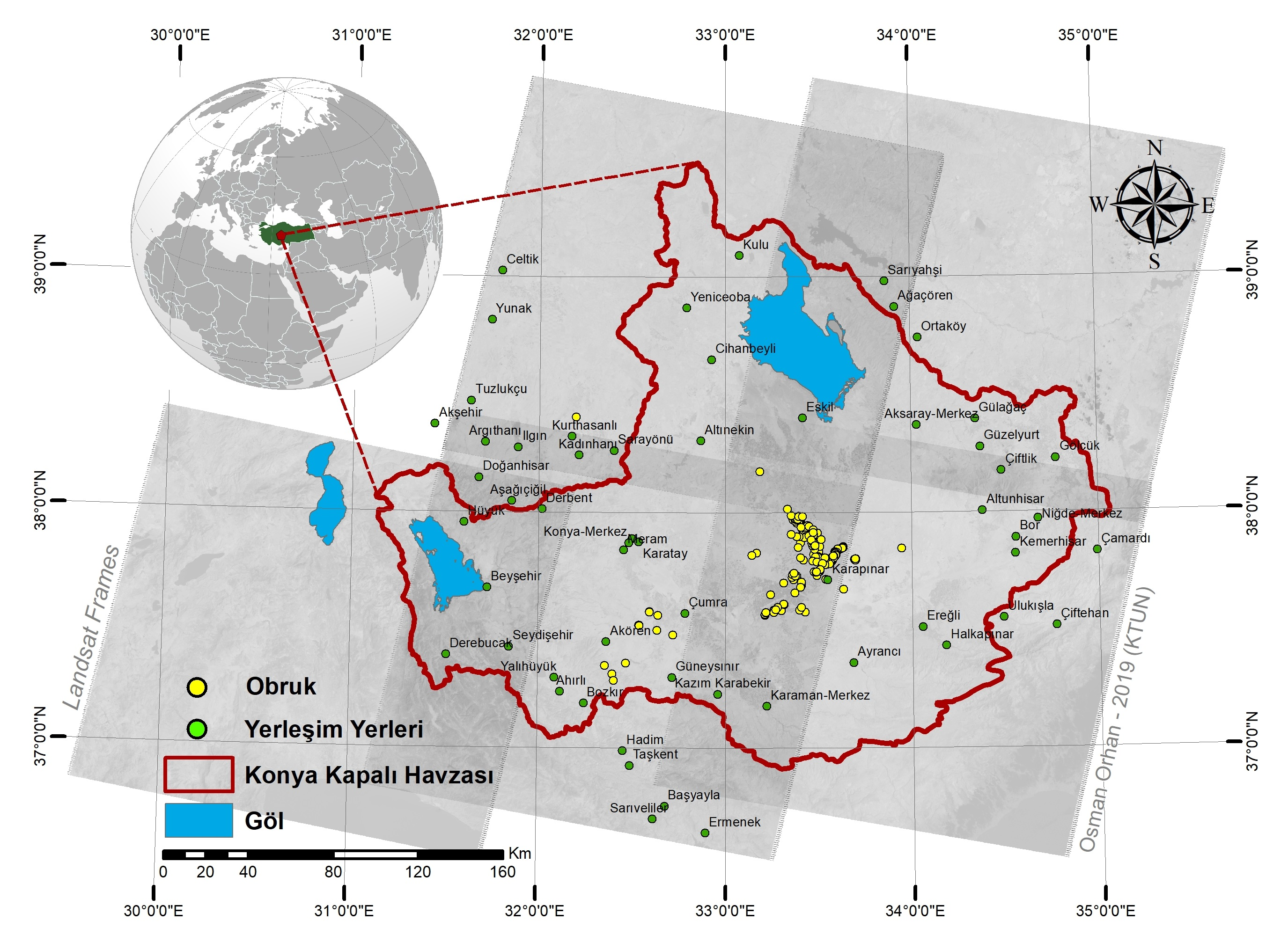 Konya Kapalı Havzasındaki obruklara ait güncel harita